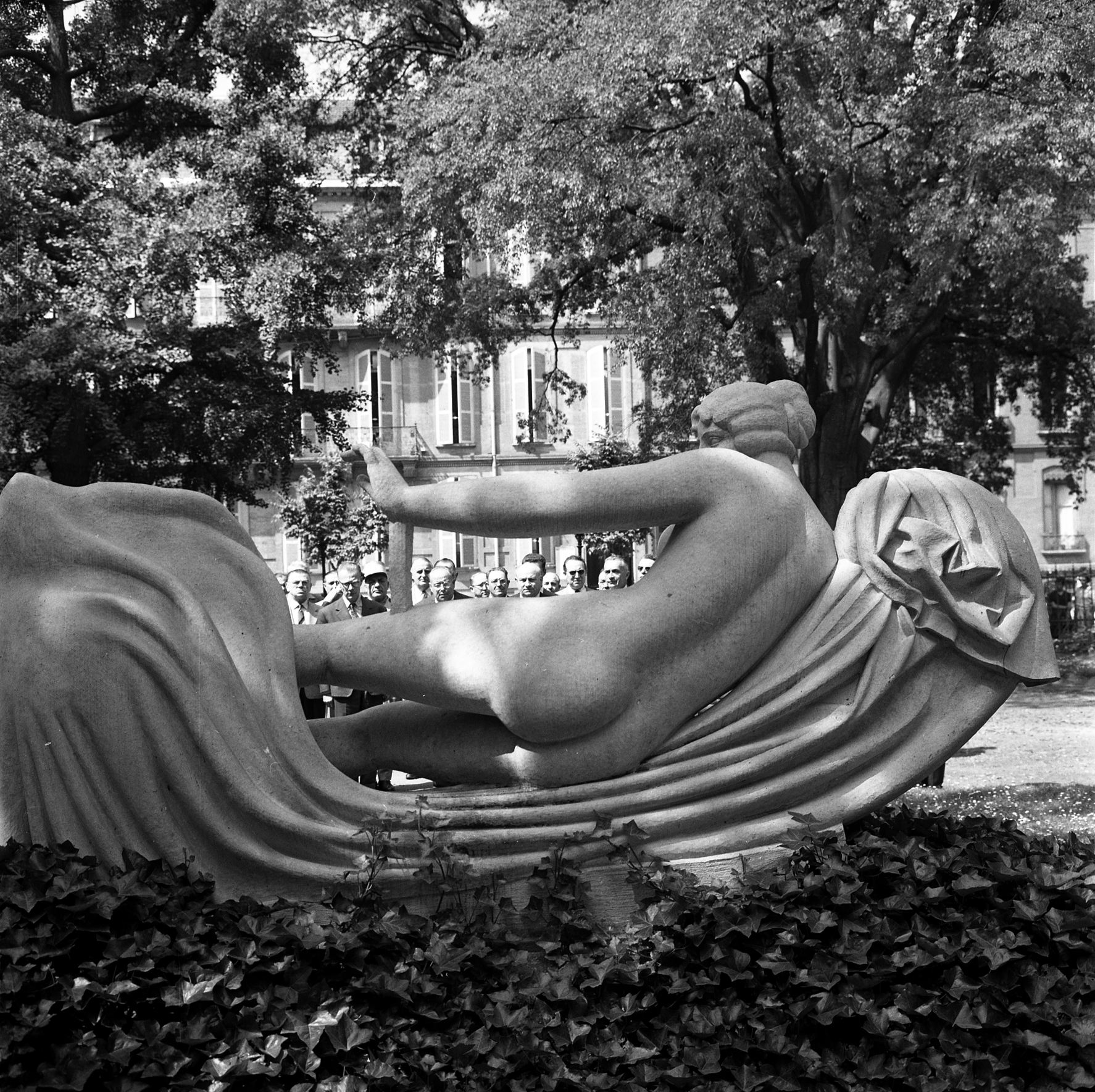 Jardin Royal, devant la statue "A la gloire des équipages pionniers de la ligne France-Amérique". 20 juin 1961. Au 1er plan vue de derrière de la statue ; au 2nd plan vue d'ensemble des personnalités venues rendre hommage aux pionniers de l'aviation dont Didier Daurat (on ne voit que les visages, le reste est caché par la statue) ; en arrière-plan façade immeuble rue Ozenne. Cliché pris lors d'une cérémonie d'hommage à la mémoire des aviateurs disparus en traçant cette ligne. Observation: Statue d'Aristide Maillol réalisée en 1938-1939, mise en place à l'entrée du Jardin Royal en 1948. Aujourd'hui elle est remplacée par une sculpture moderne.